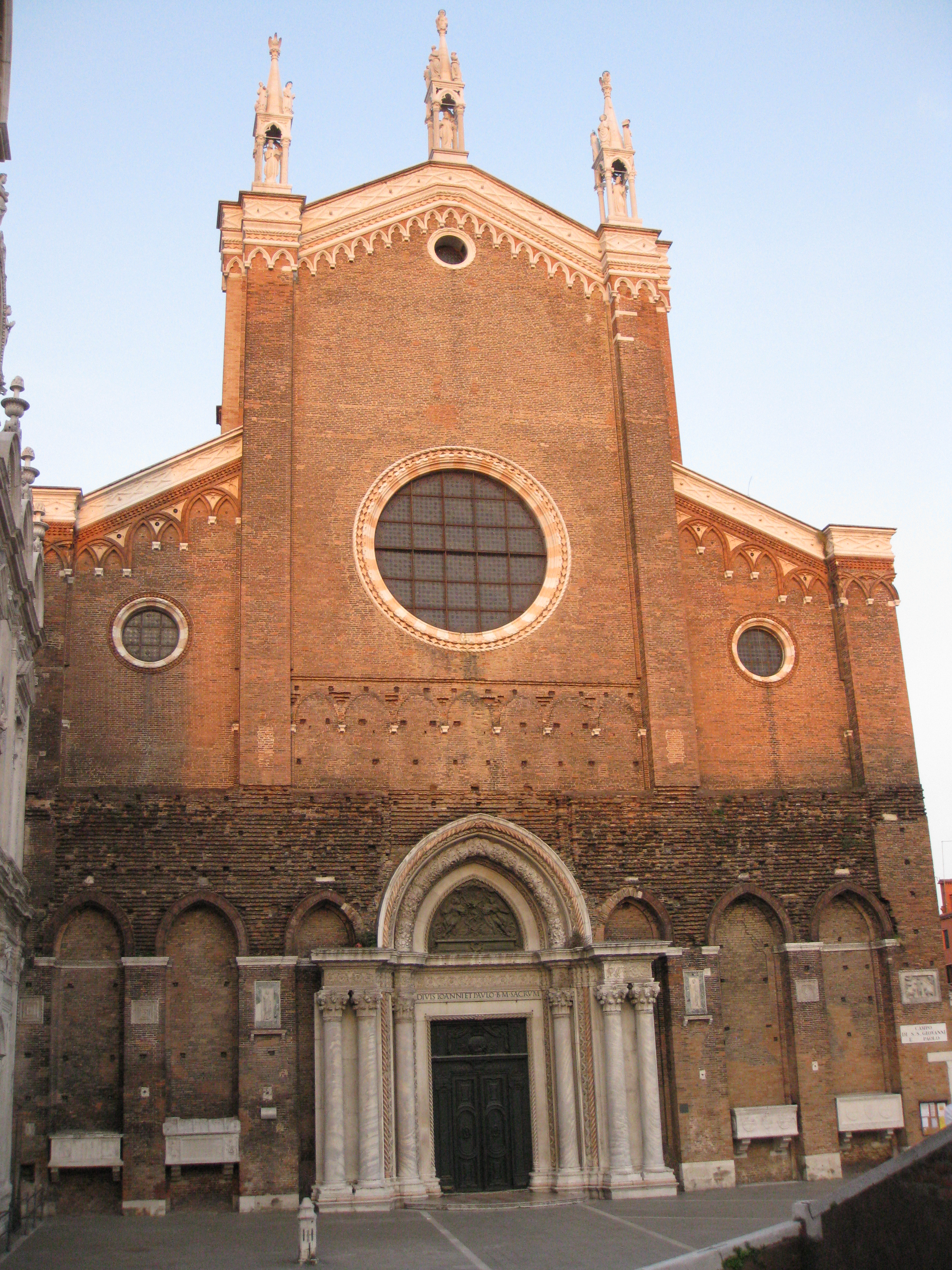 Venezia - Basilica dei Santi Giovanni e Paolo